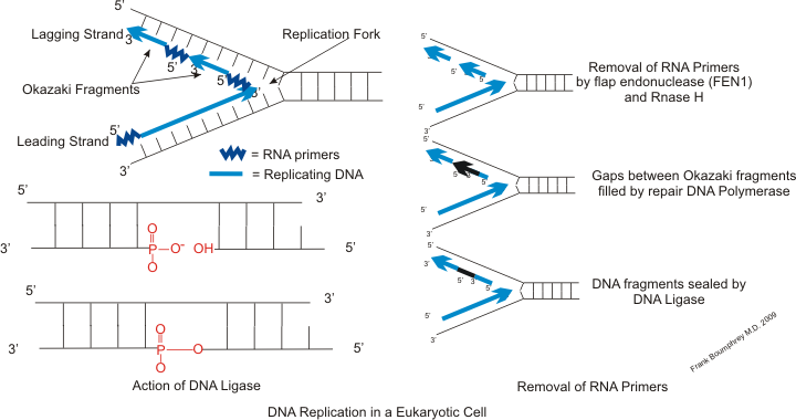 רפליקציית DNA בתא אאוקריוטי, תוך שימוש בתחל.